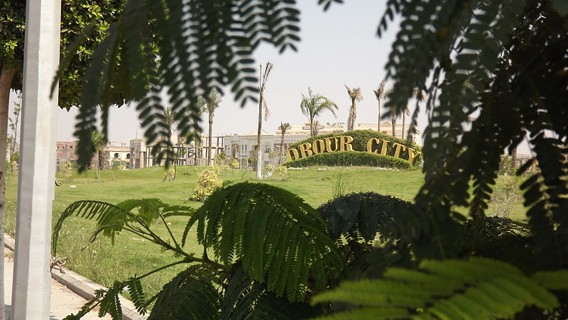 لقطات داخل مدينة العبور.